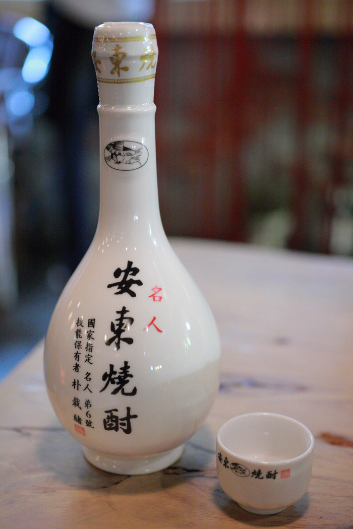 안동소주 박재서 명인의 안동소주 호리병 사진